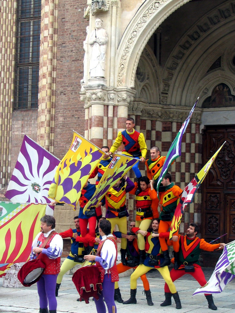 Palio di Asti , Gruppo sbandieratori dell' A.S.T.A.